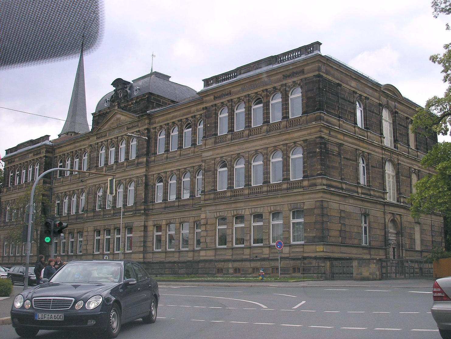 Altes Volksschulgebäude in Lichtenfels (Oberfranken)